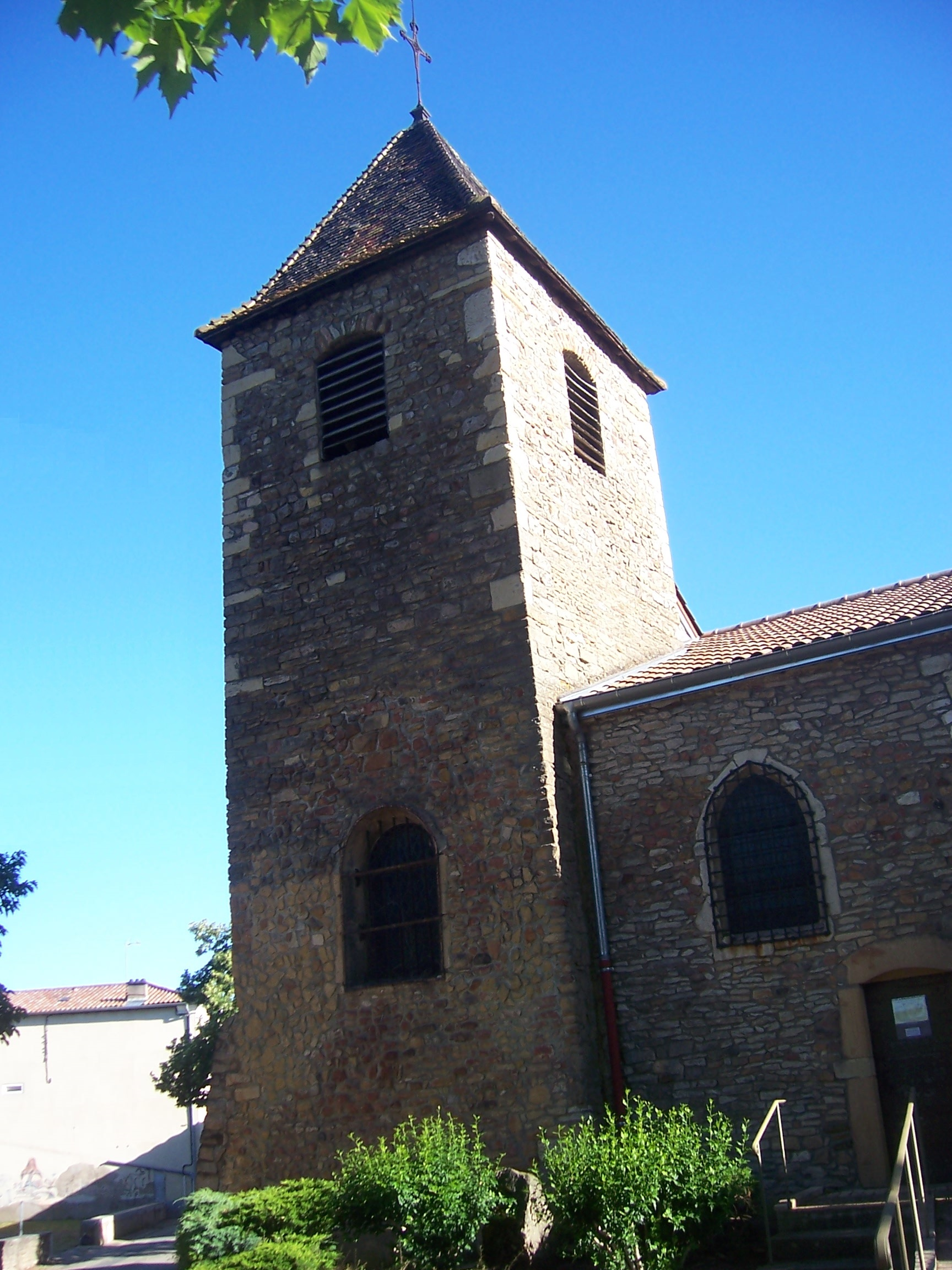 L'église de Saint-Symphorien d'Ancelles